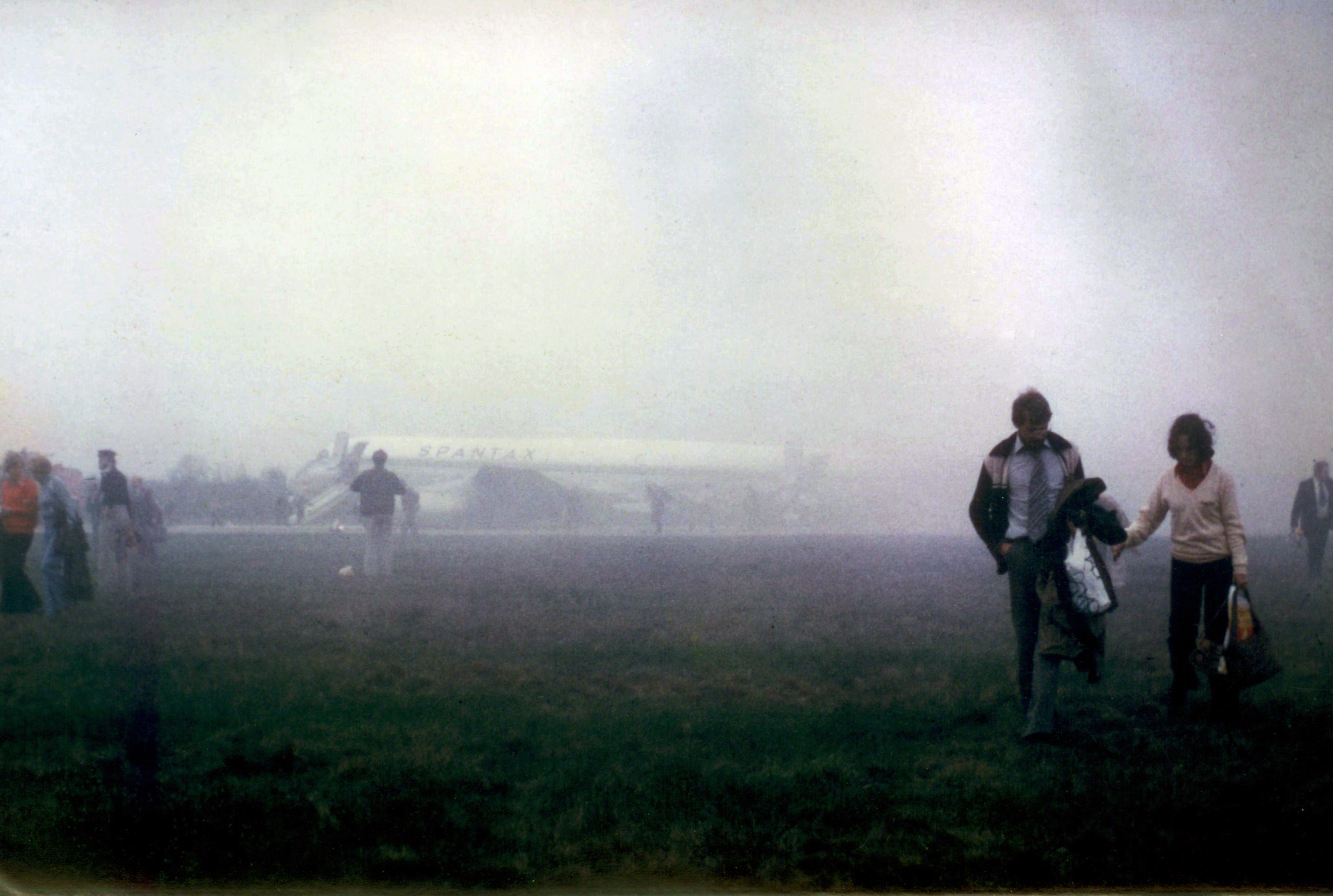 Aufnahme vom Crash einer Spantax-Maschine auf dem Flughafen Köln-Bonn am 4. April 1978